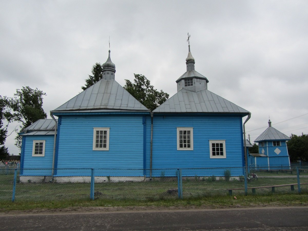 Варані. Свята-Мікалаеўская царква